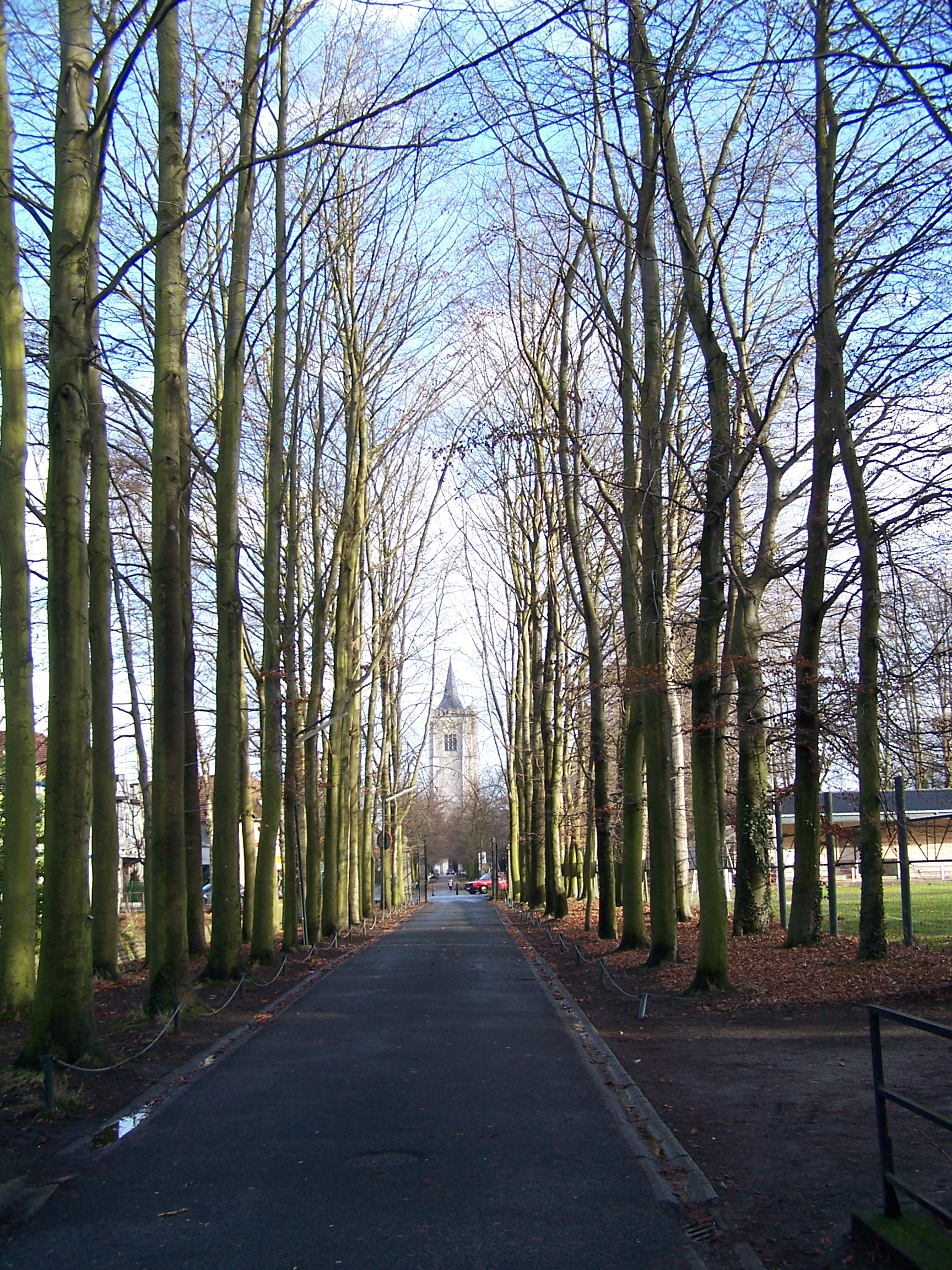 zicht op de bestaande aanplantingen in de dreef op het kasteelparkgedeelte